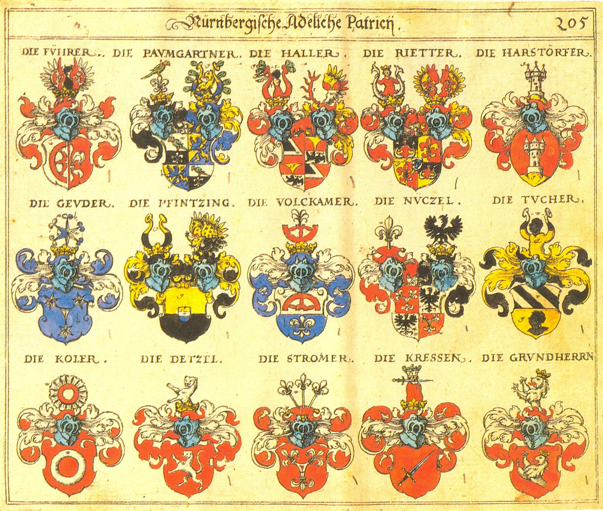 Johann Siebmacher: New Wappenbuch eingescannt aus: Horst Appuhn (Hrsg.), Johann Siebmachers Wappenbuch. Die bibliophilen Taschenbücher 538, 2. verb. Aufl , Dortmund 1989 Patrizier und Adel Nürnberg Blatt 205